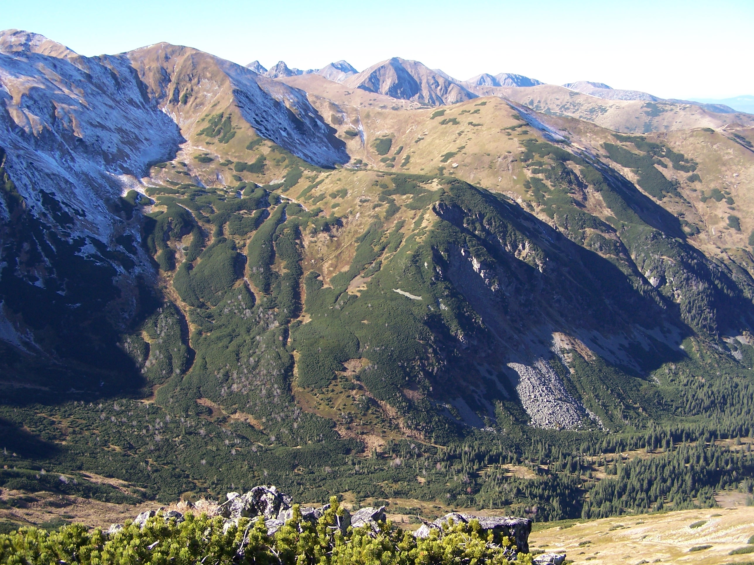 Widok z Ornaku. Od lewej strony:Jarząbczy Wierch, Kończysty wierch, Czubik, ponad nimi Wołowiec, Rohacze. W dole Dolina Starorobociańska